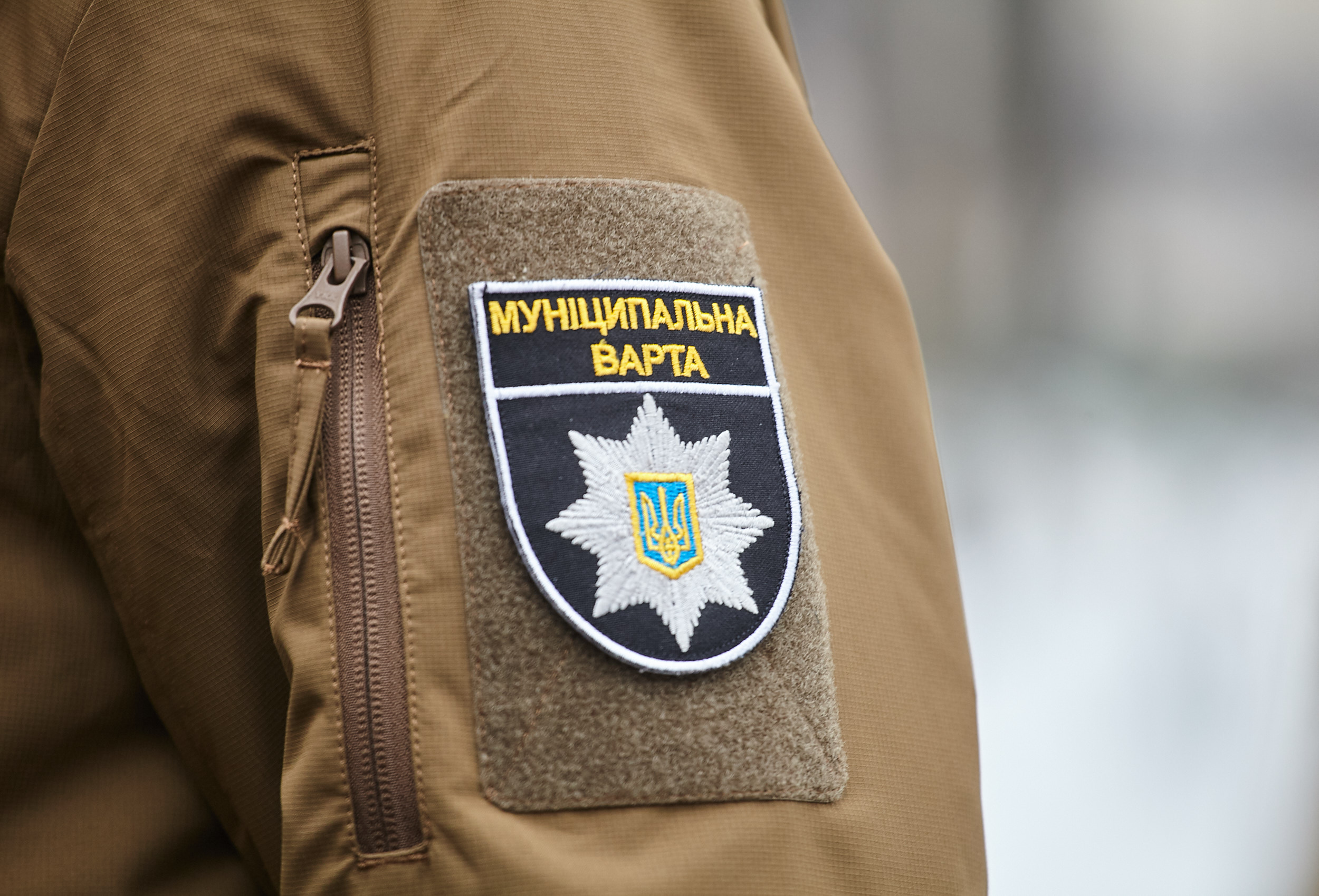 Муниципальная стража